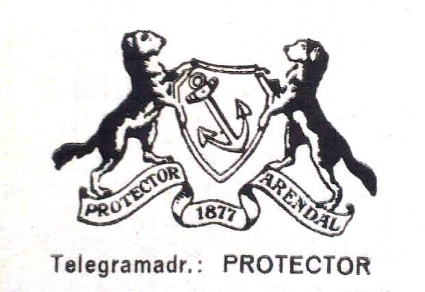 Protectors logo